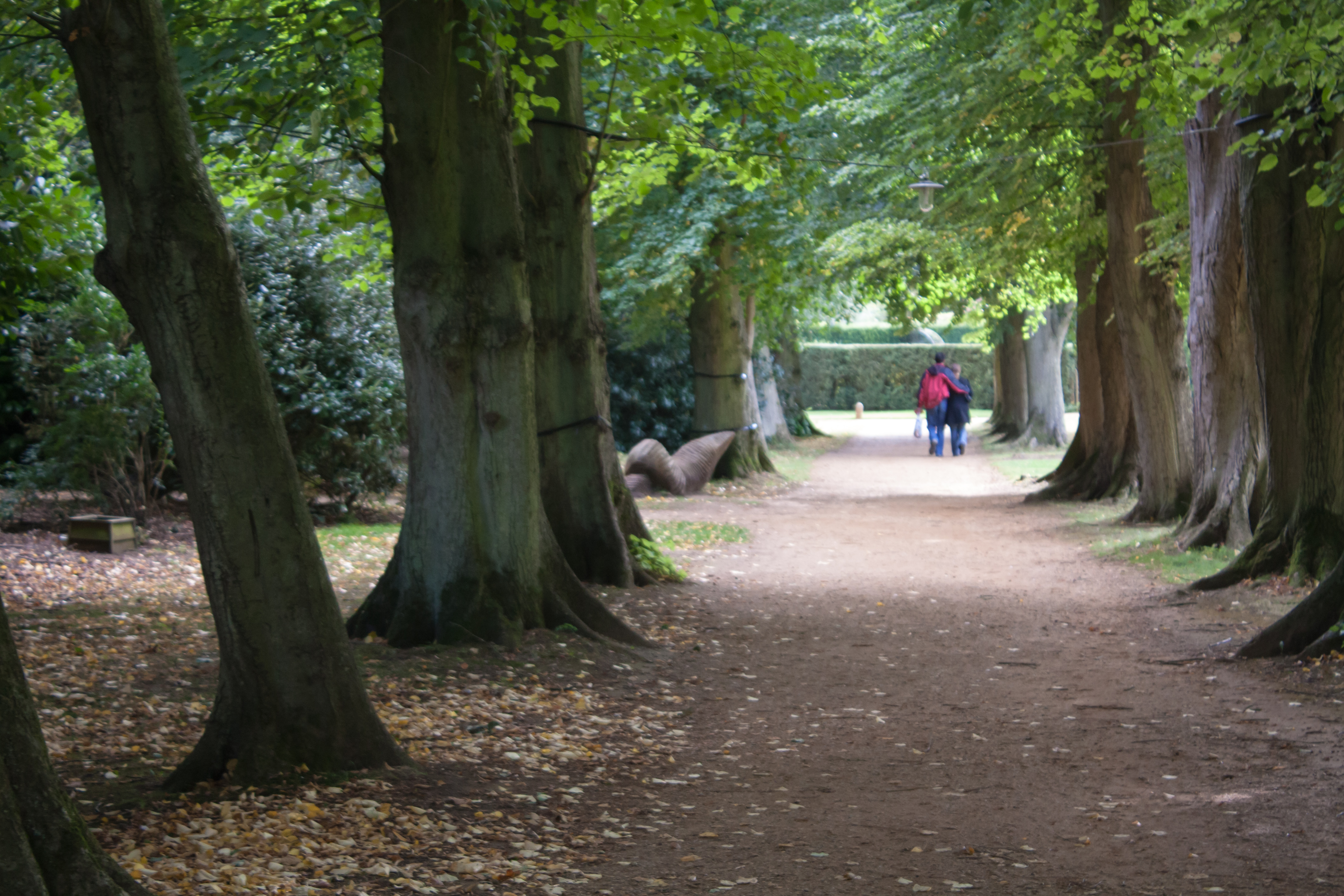 Lime Tree Avenue